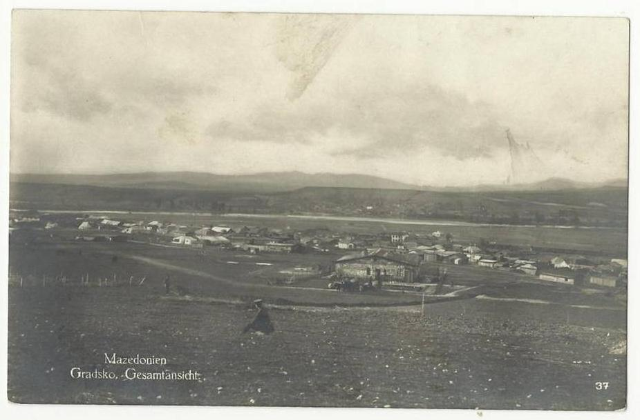 Градско през Първата световна война